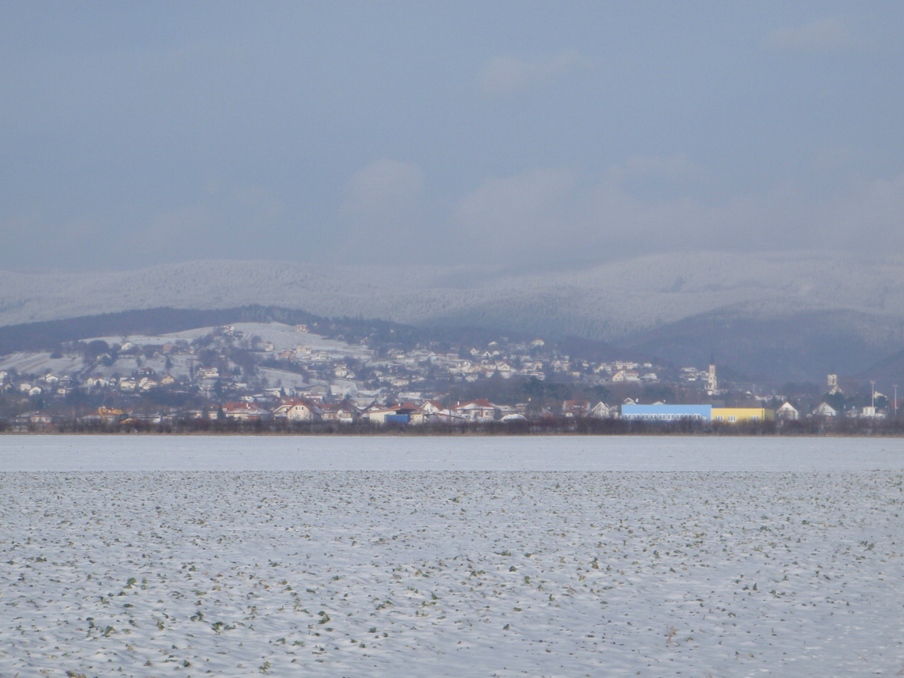 Rechnitzim im Winter